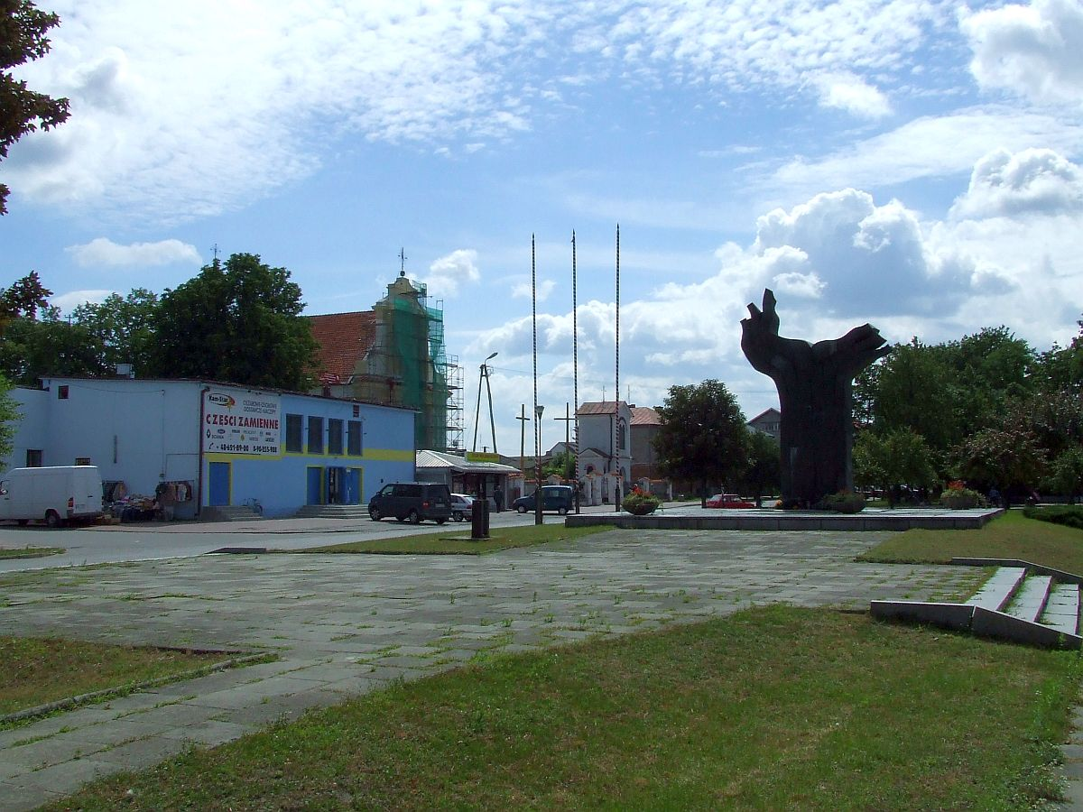 Magnuszew, rynek